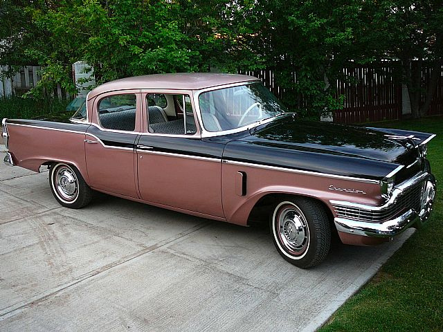 1957 Studebaker Champion 4-door sedan